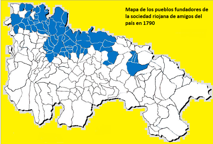 Mapa con los pueblos (en Azul) que fundaron la sociedad riojana de amigos del país y que inicialmente pertenecieron a ella.